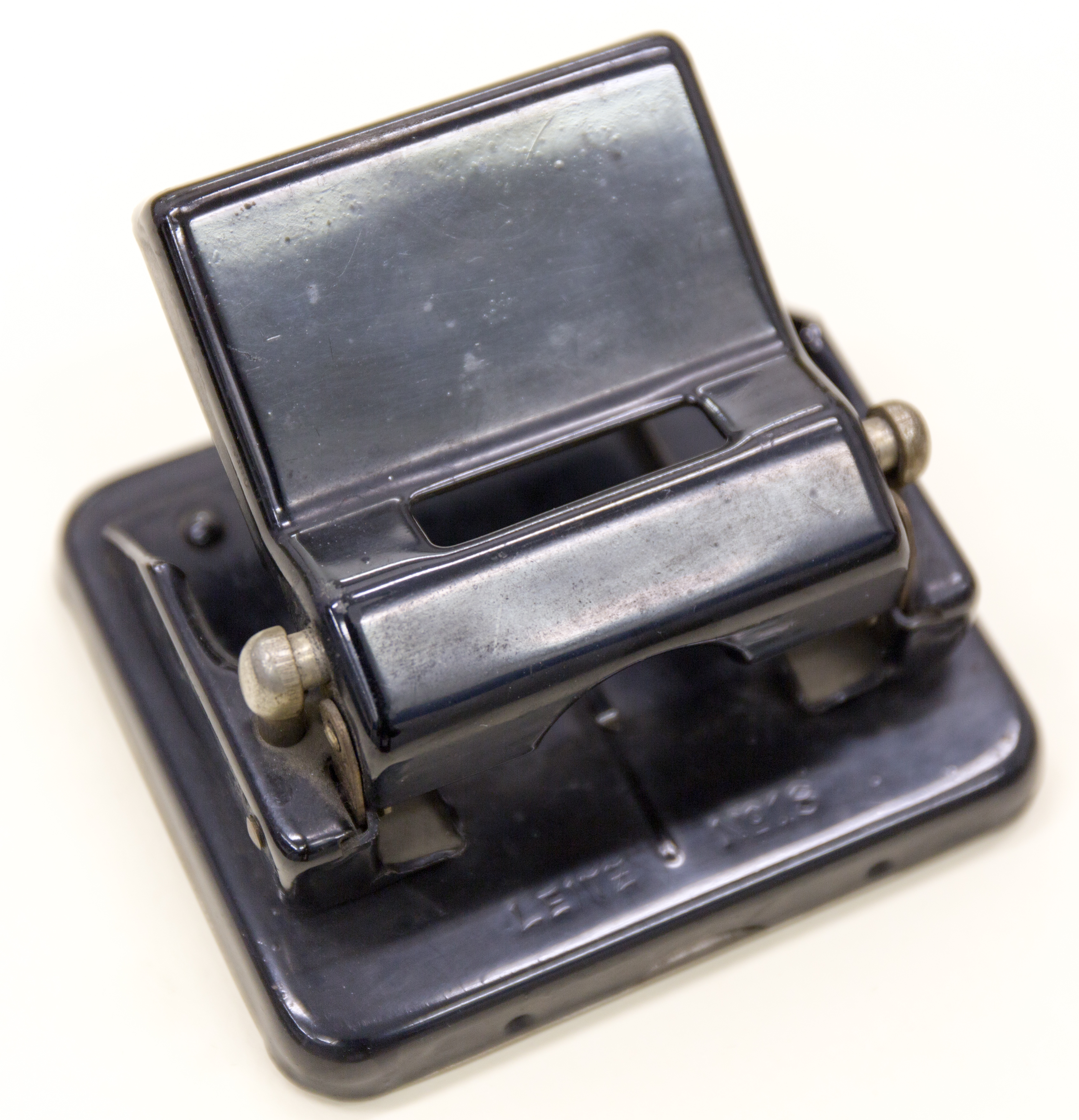 Papierlocher (2) a) Leitz No. 18. b) Herdegen Indetifikations-Nr.: N (9 A 78) 217/1992, a-b Herstellungsort: Stuttgart Höhe x Breite x Tiefe: 7 x 10 x 9 cm Höhe x Breite x Tiefe: 7 x 10 x 8 cm Ausgabe: Metallblech, gestanzt und lackiert Zustand: gebraucht Beschreibung: Zwei schwarze Papierlocher aus Blech, einfache Ausführung mit eingeprägten Inschriften: a) „Leitz No. 18“ (Oberseite) b) „Herlegen“ (Oberseite), „Made in Germany“ (Unterseite)